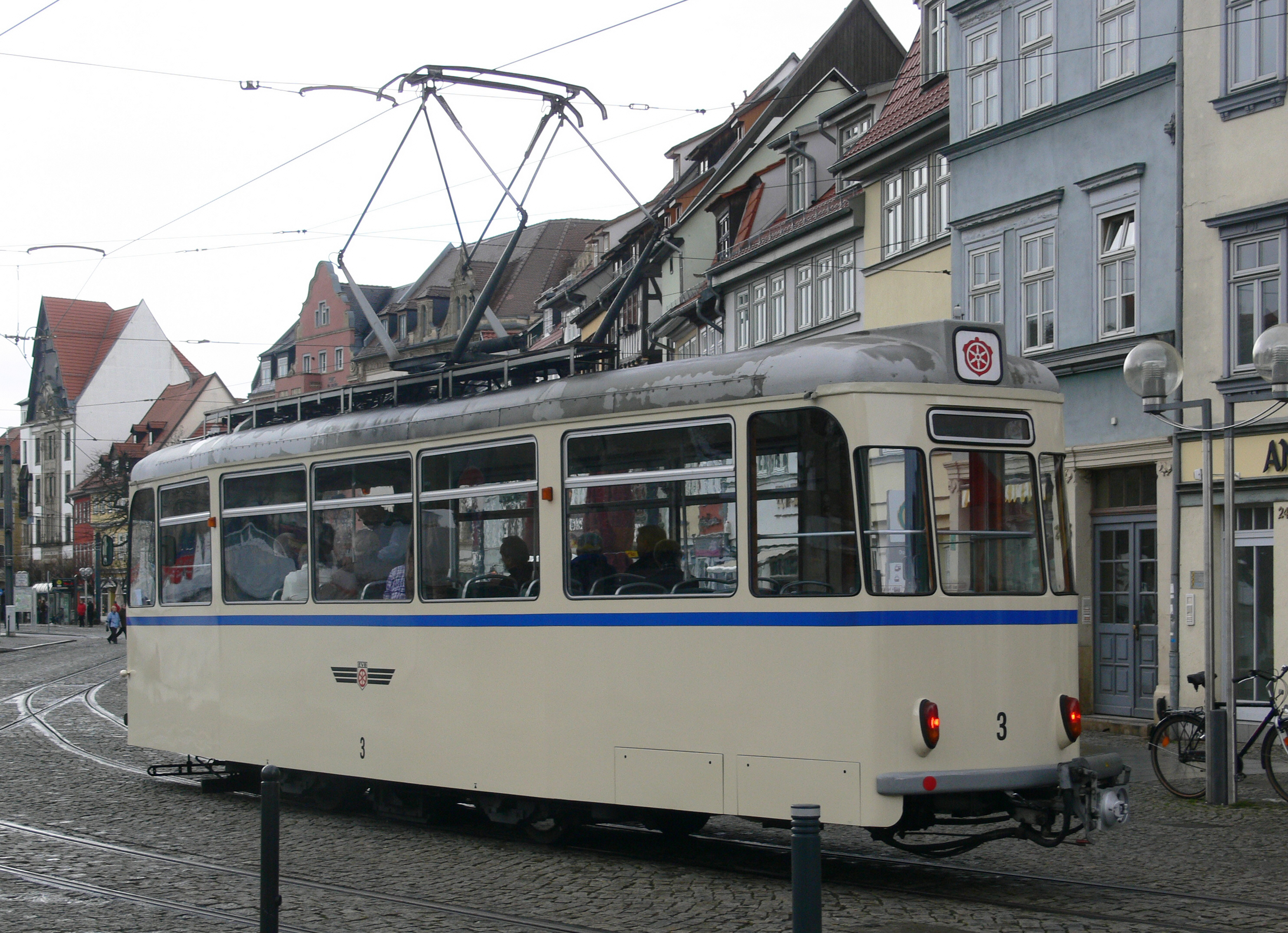 Erfurt, historischer Straßenbahnwagen T2D von 1967 (gebaut von ČKD Tatra) am Domplatz